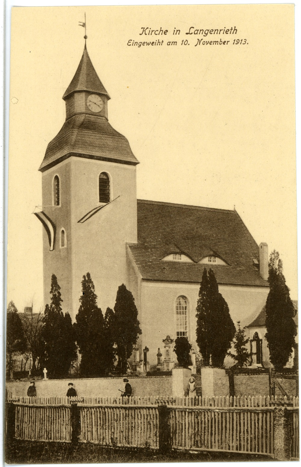 Langenrieth; Kirche This postcard is from publisher Brück & Sohn in Meißen ( postcard has a unique number 17304 and is available in a higher resolution at the publisher. This images was uploaded in a cooperation project between Wikipedians and the publisher.